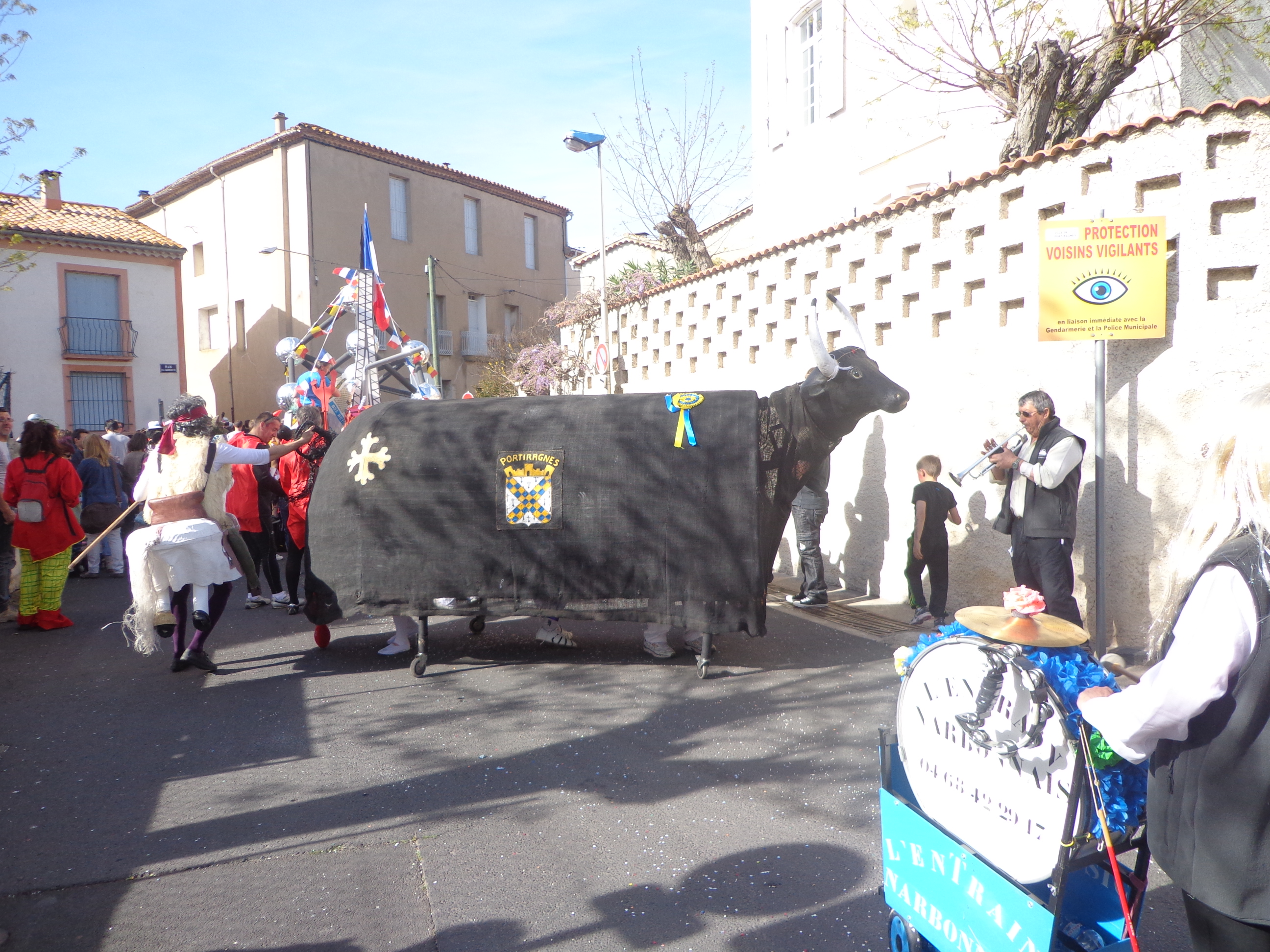 Portiragnes (Hérault) - lo Buòu (lou Biou - le Bœuf) de Portiragnes, animal totémique de la commune, défilant dans les rues du village.